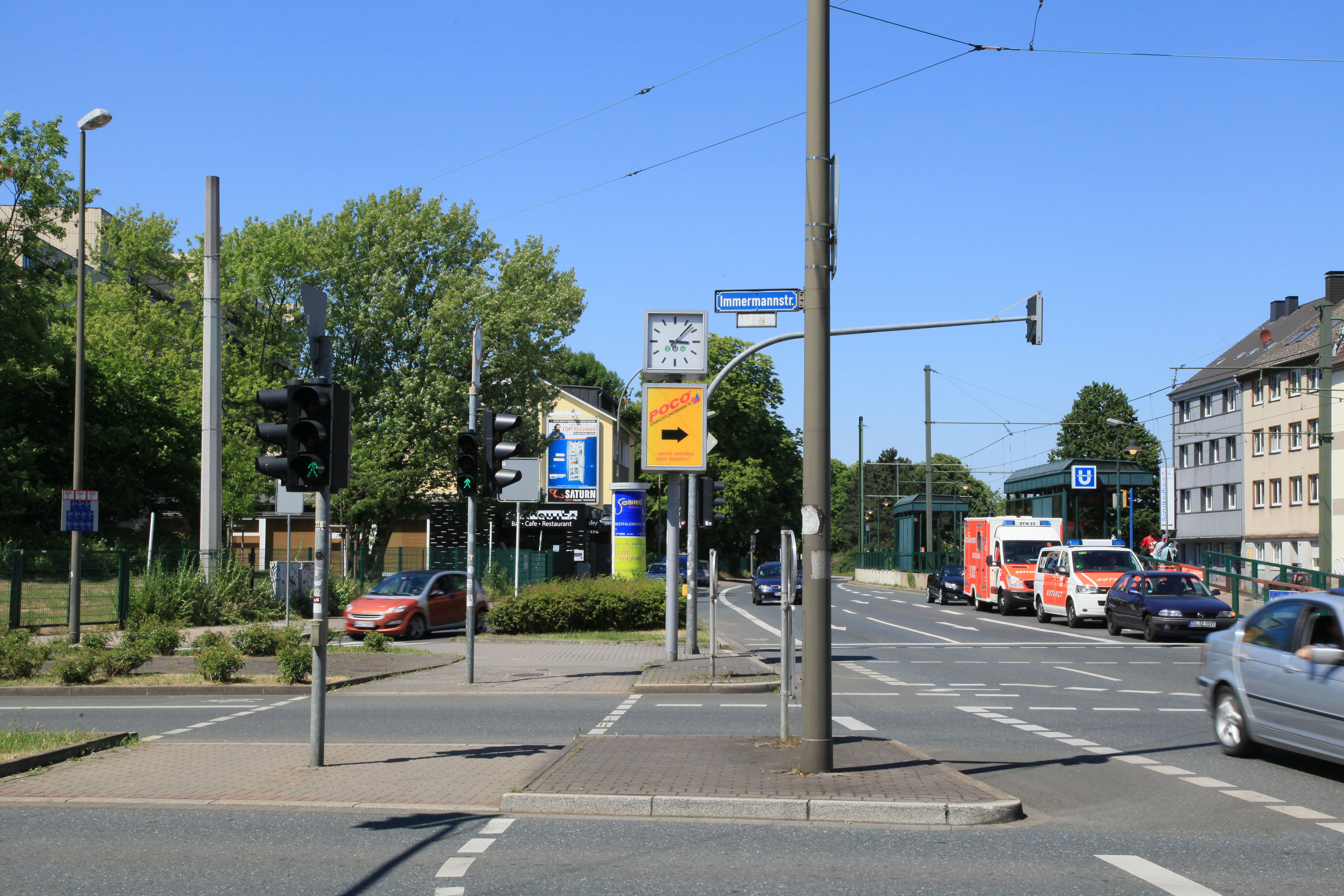 Kreuzung Immermannstraße (vorn) und Münsterstraße (links) in Dortmund